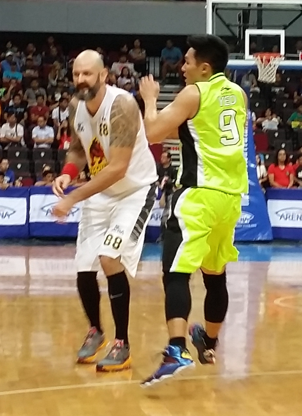 PBA - Globalport vs Barako Bull - Mick Pennissi-Barako Bull - 2015-1225